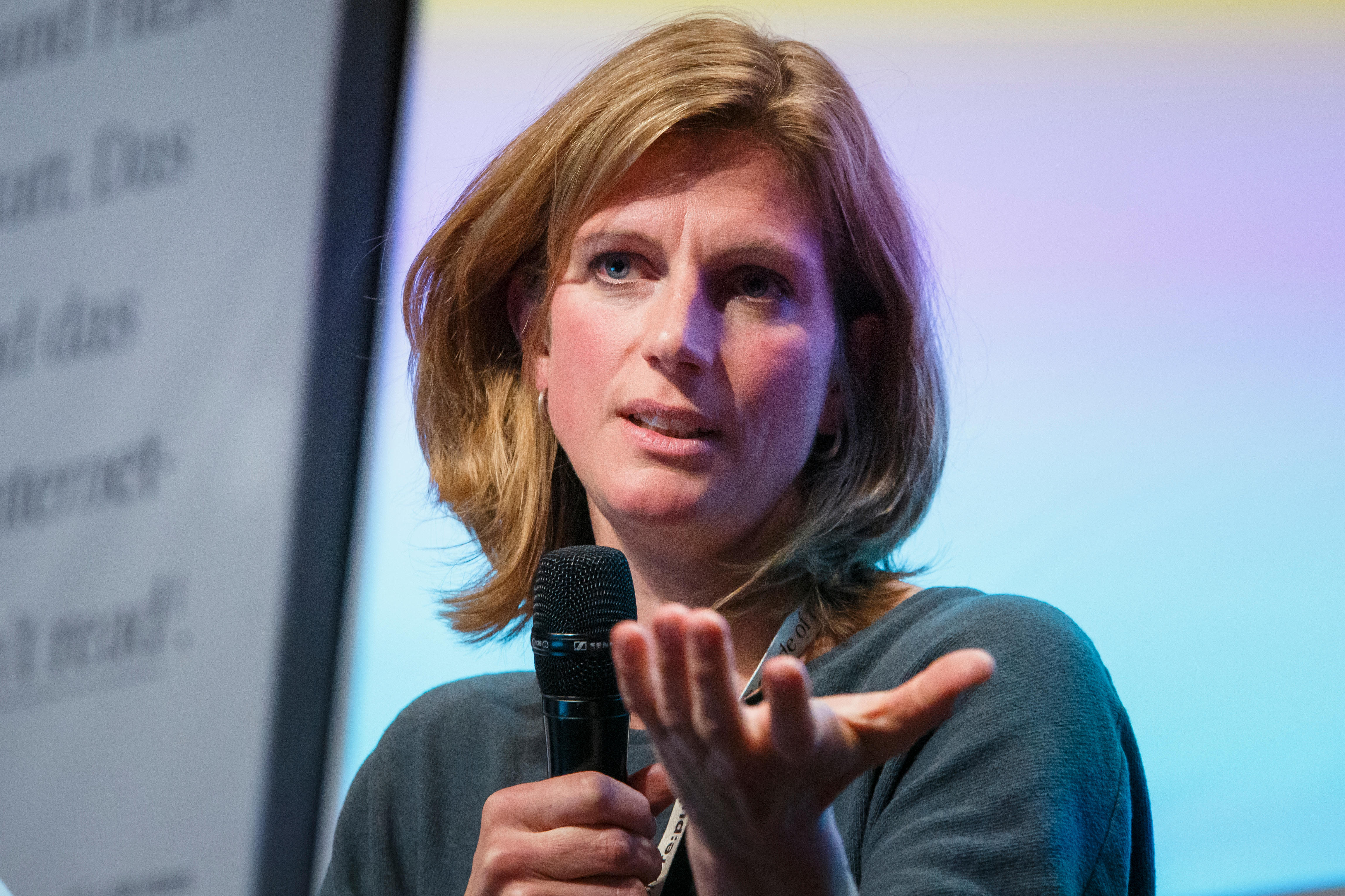 Session: Neue Bewegung(en) für den Klimaschutz Speaker: Maja Göpel, Jochen Flasbarth, Lucia Parbel, Marc Winkelmann